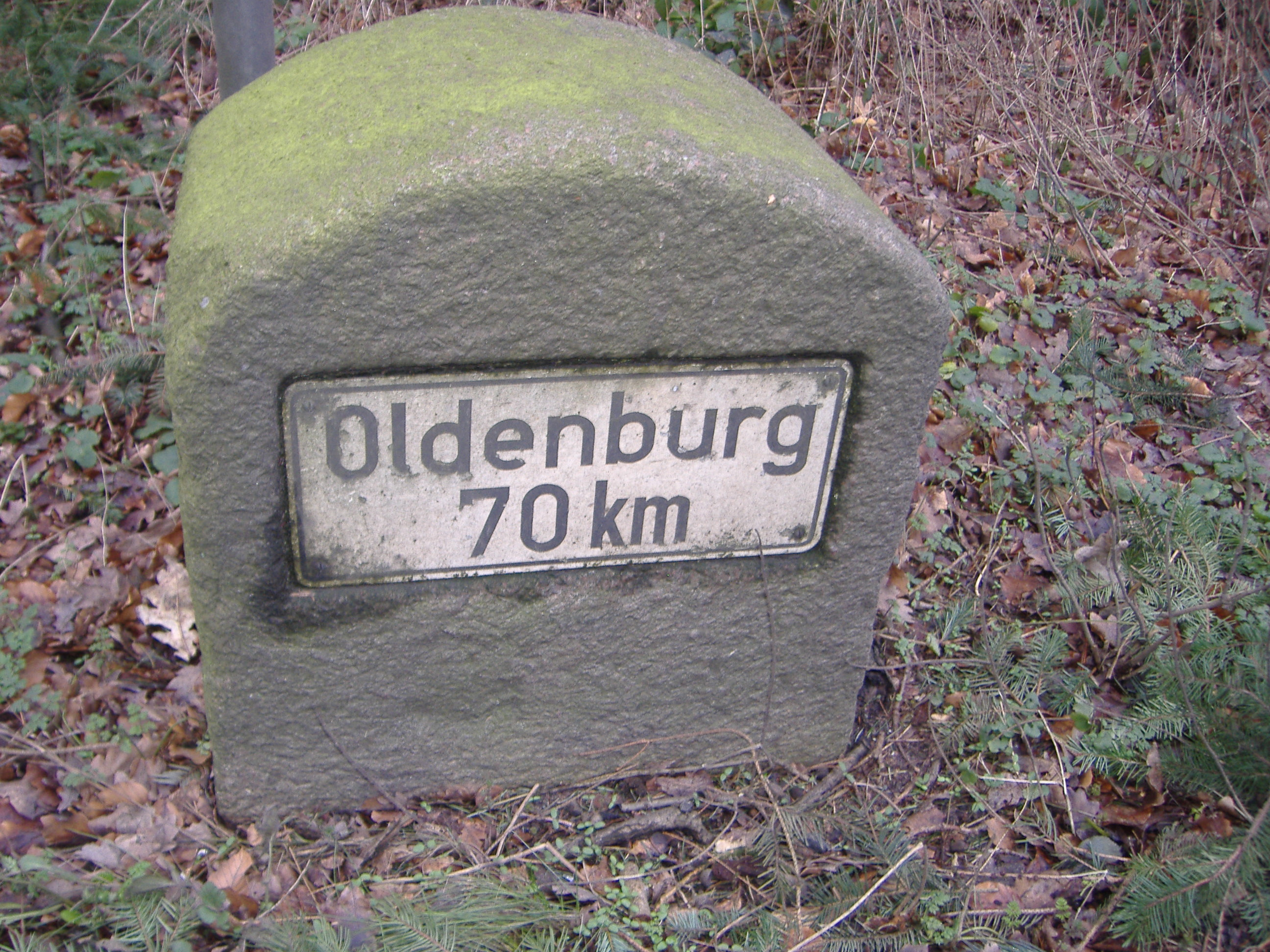 Ein alter Kilometerstein in den Dammer Bergen. An old milestone.